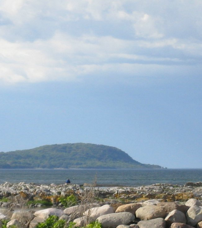 Stenshuvud, national park in Skåne, Sweden.